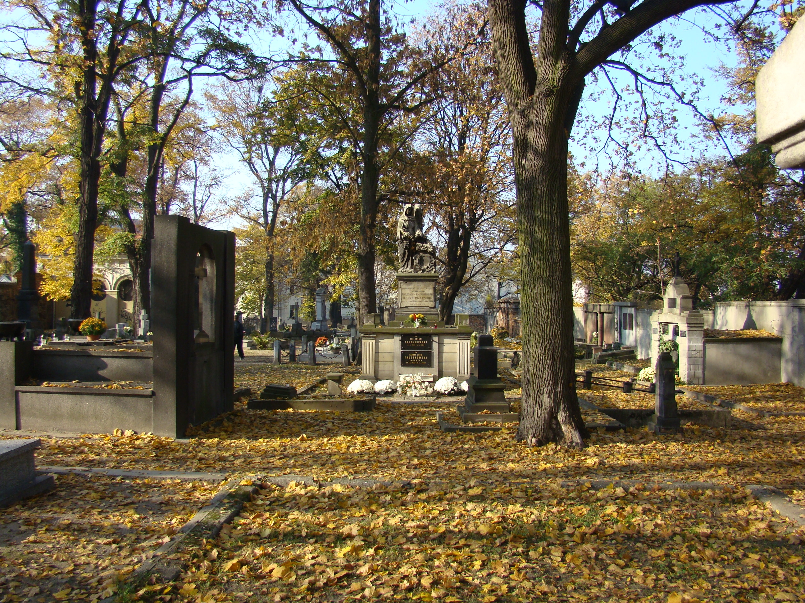 Cmentarz Parafii Ewangelickiej w Kaliszu 03